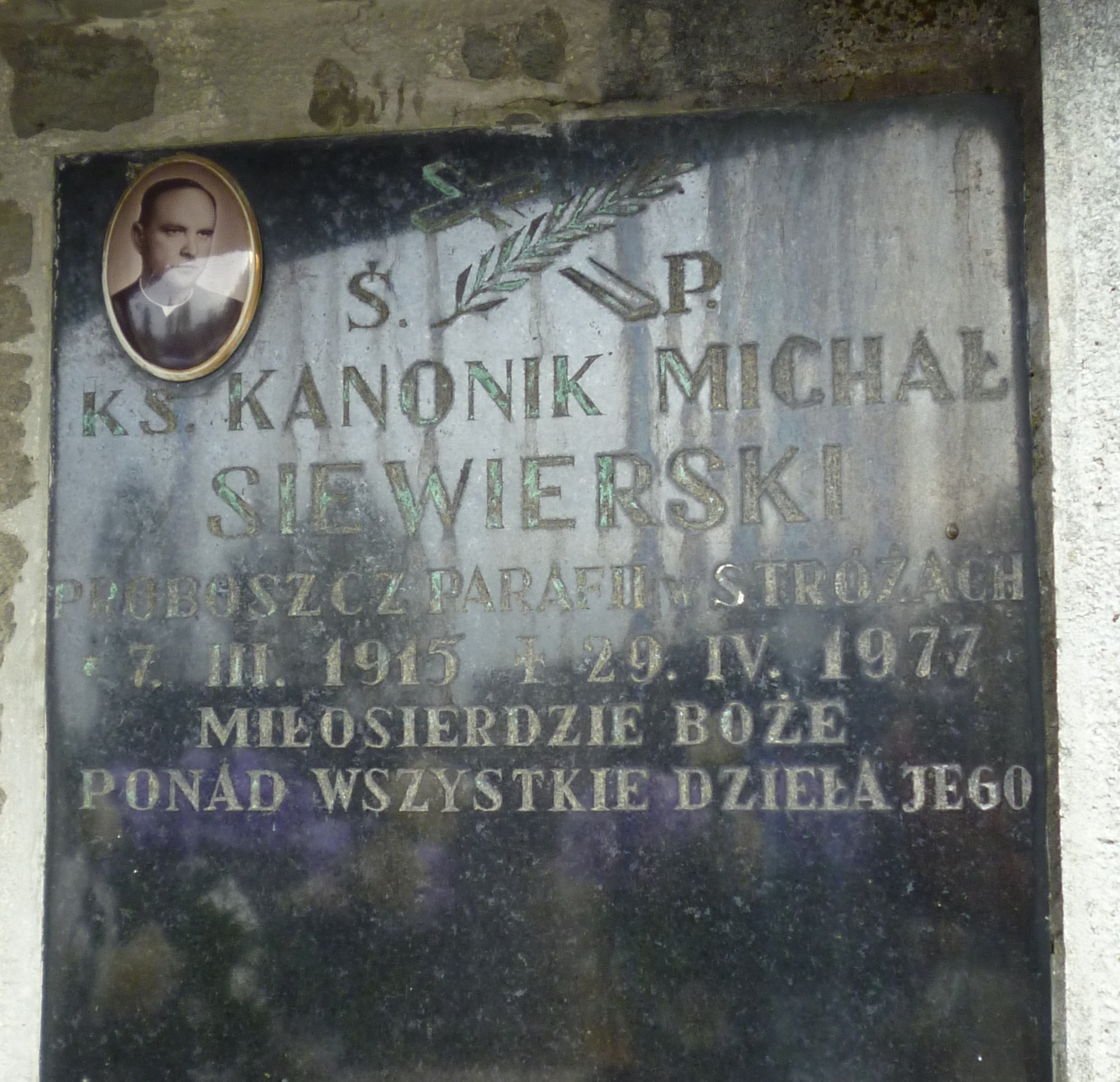 Michał Siewierski, tablica na grobowcu na cmentarzu parafialnym w Stróżach